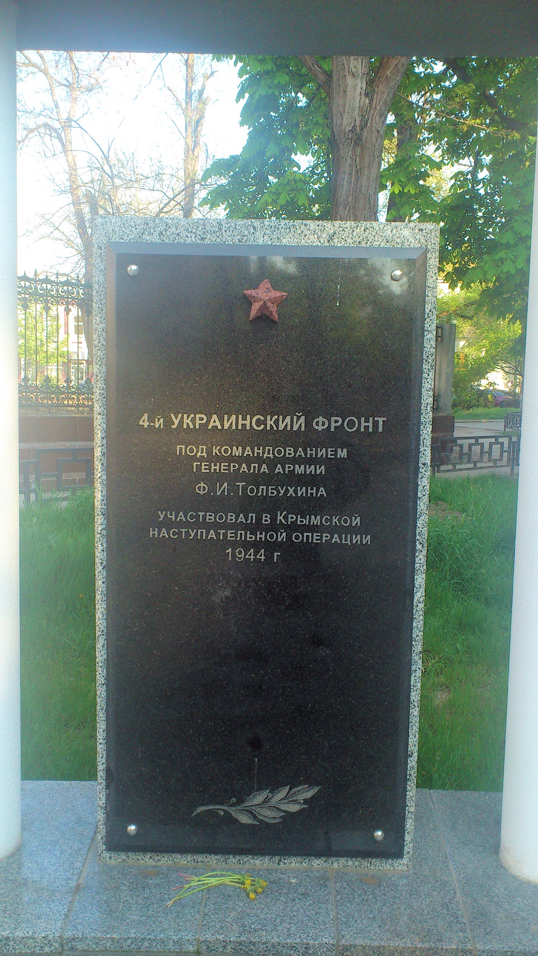 Надпись на плите: "51-я армия защищала Крым в 1941-1942 гг. В 1944 г. участвовала в освобождении Джанкоя, Симферополя, Севастополя. 417 Сивашская Краснознамённая ордена Суворова II степени стрелковая дивизия."